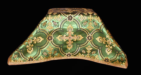 zelf gemaakt